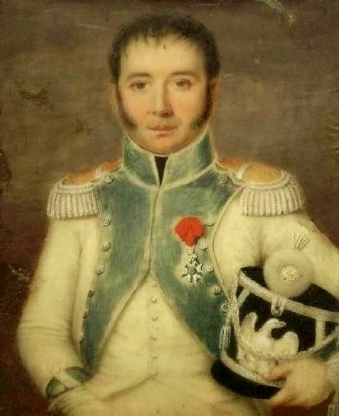 Le général de brigade baron Jean-Baptiste Isidore Lamarque d'Arrouzat. En 1813, commandant une brigade du corps d'armée du maréchal Suchet, il défend la ville de Lérida contre les Anglo-Espagnols.